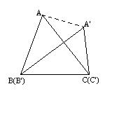 佩多不等式证明用图